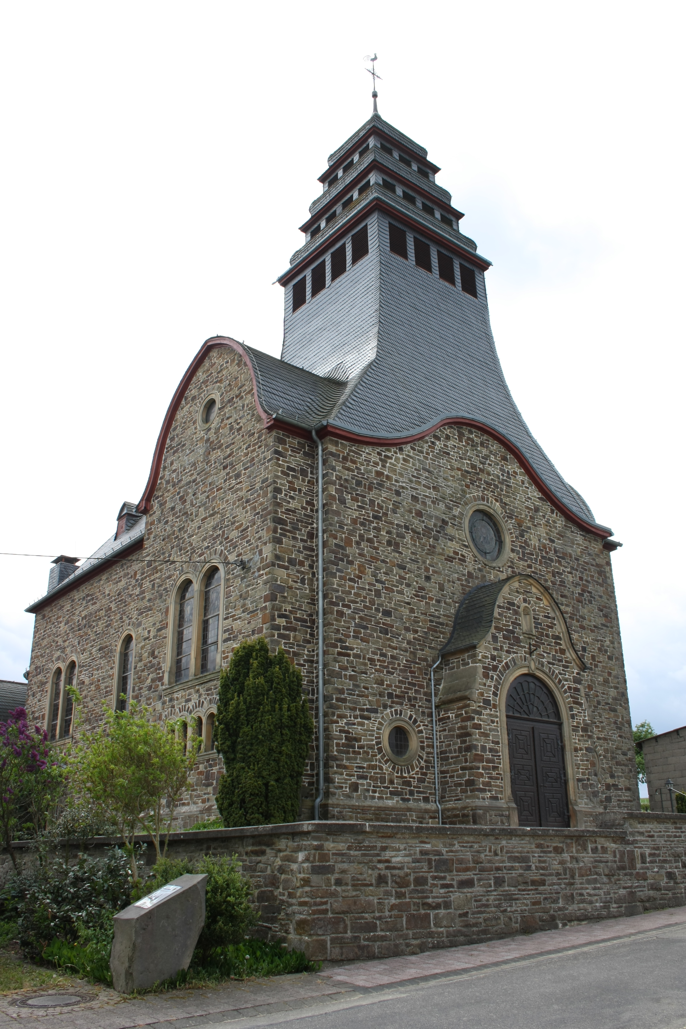 katholische Filialkirche St. Agatha in Bongard